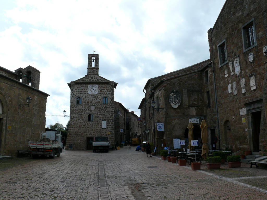 Sovana, Piazza del Pretorio